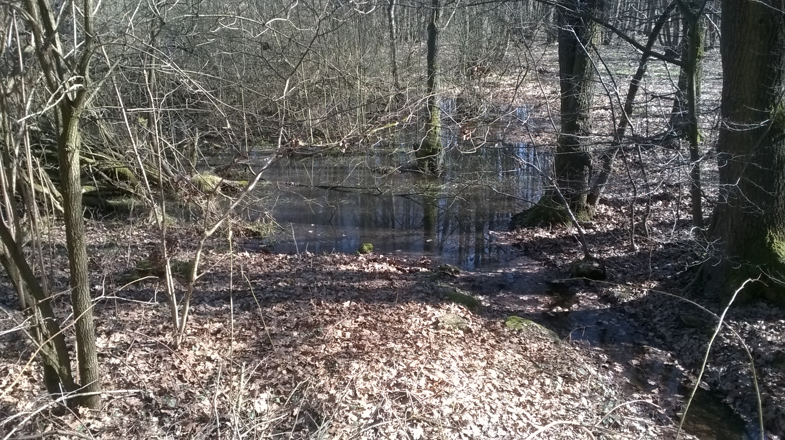 xxxxx